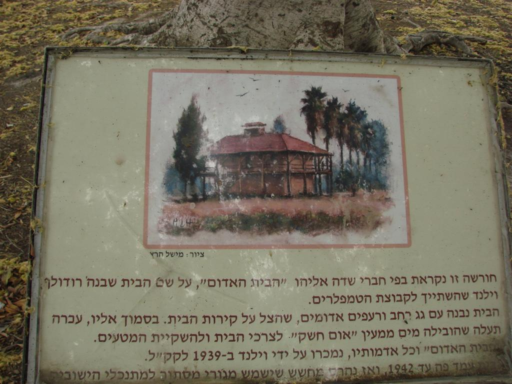 אתר בית וילנד - טירת צבי - 1